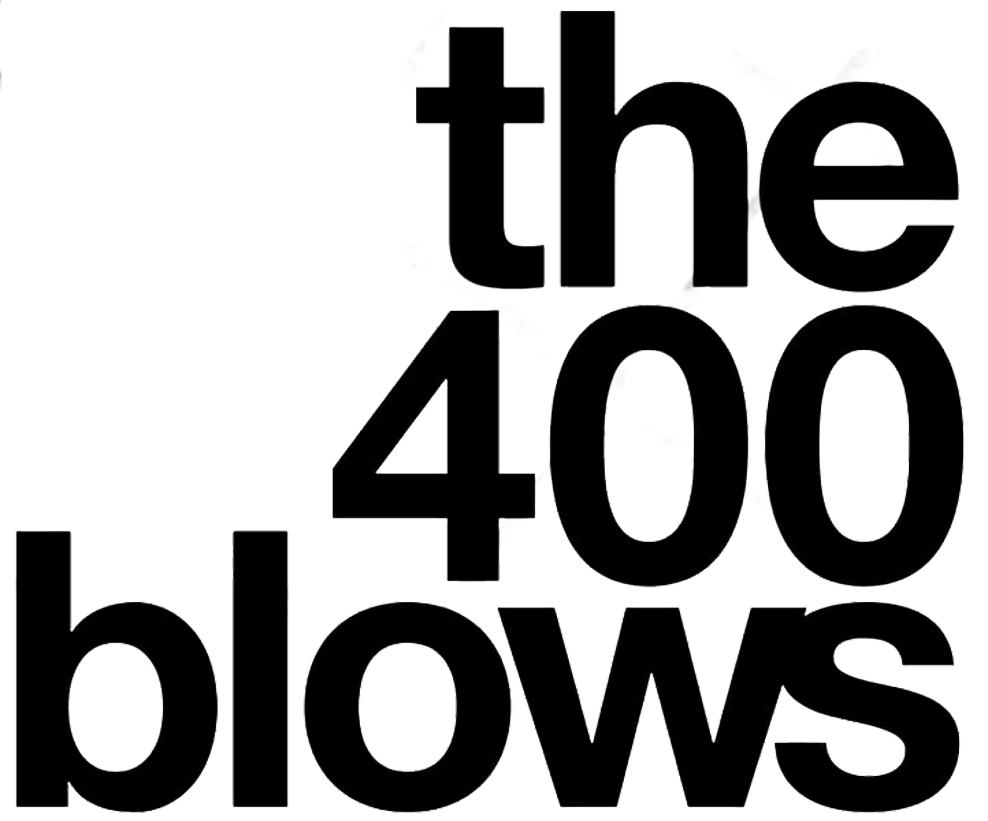 "The 400" Blows movie logo